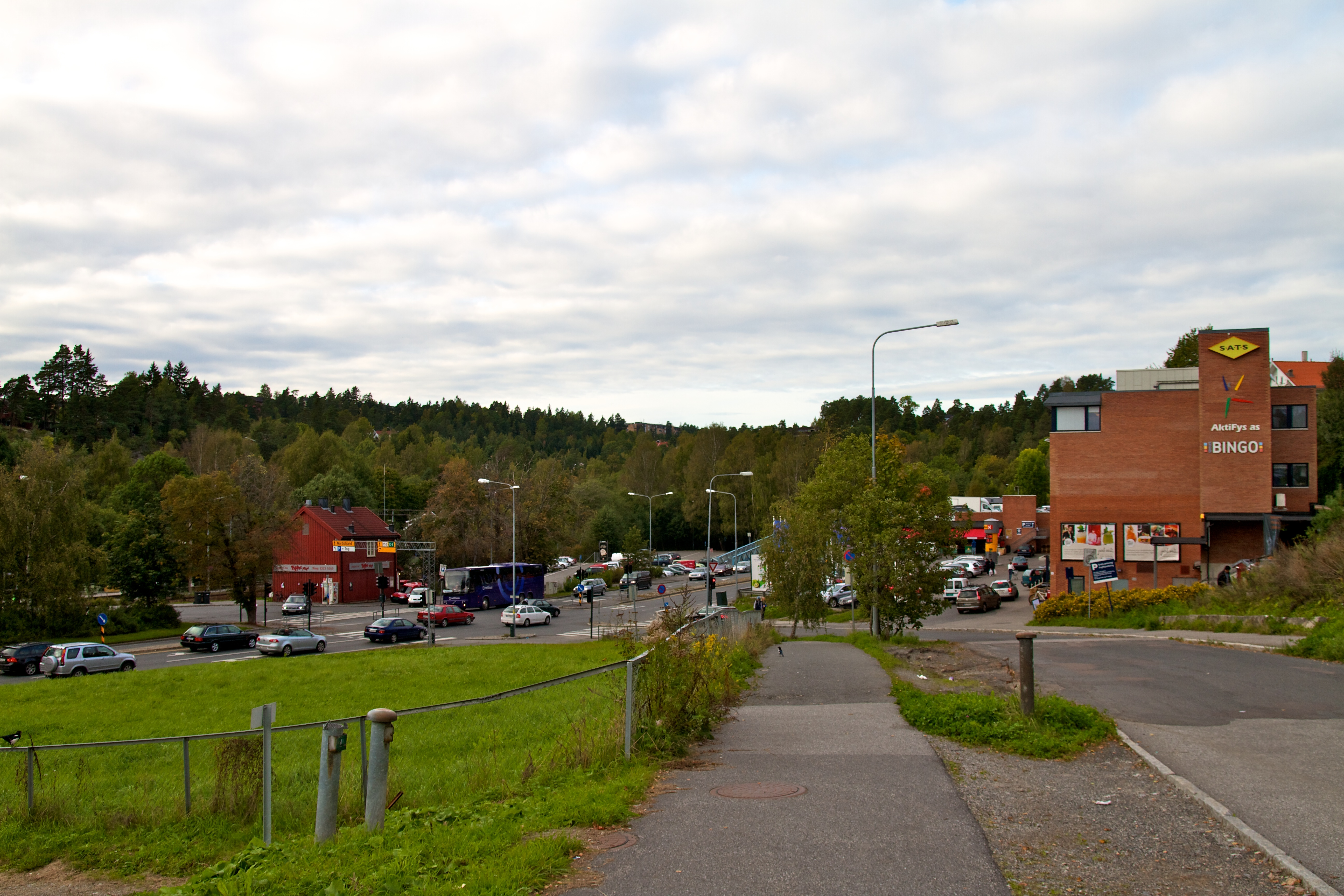 Hauketo.